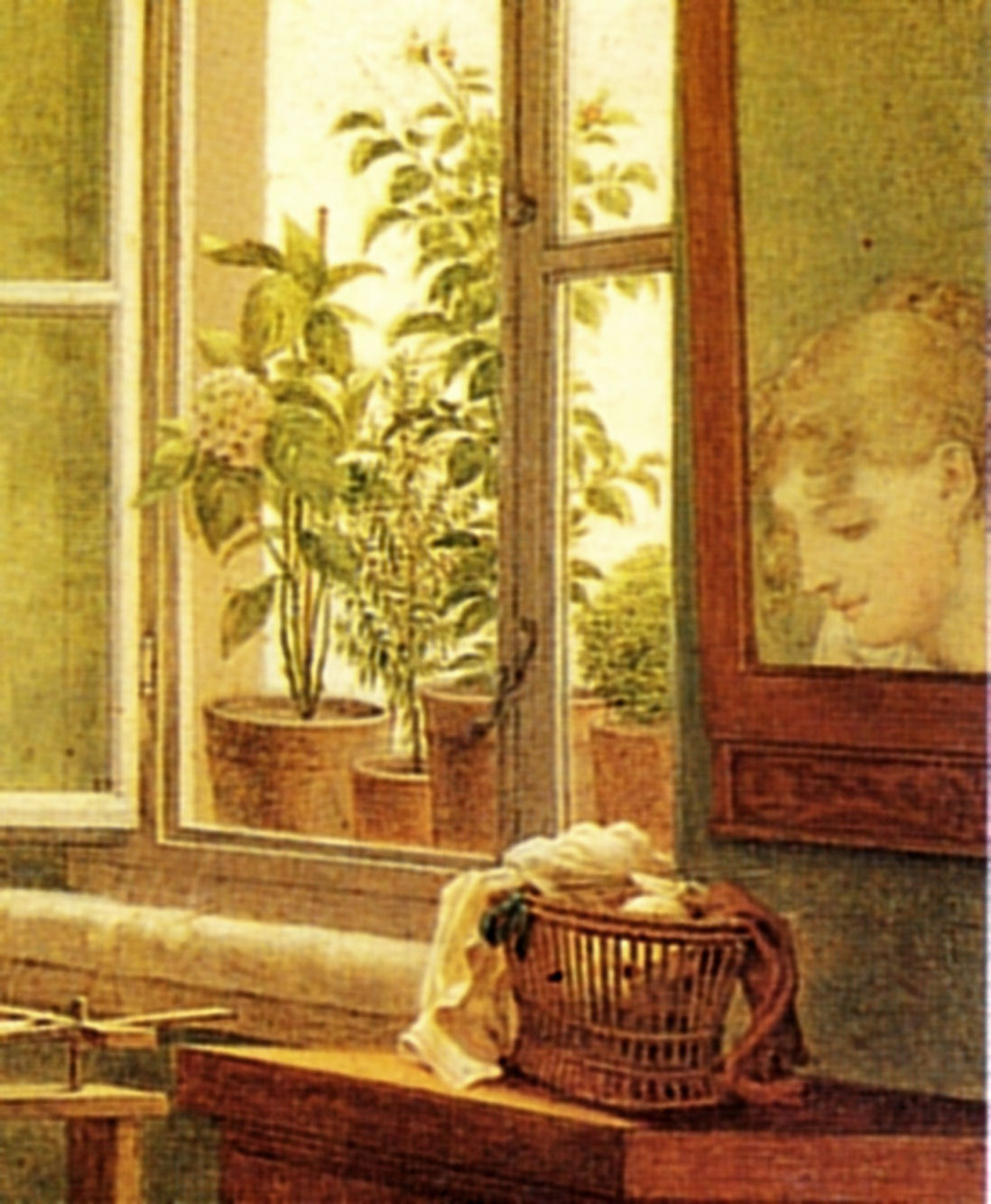 Erste Fassung 1812. Dargestellt ist Louise Seidler. Detail.